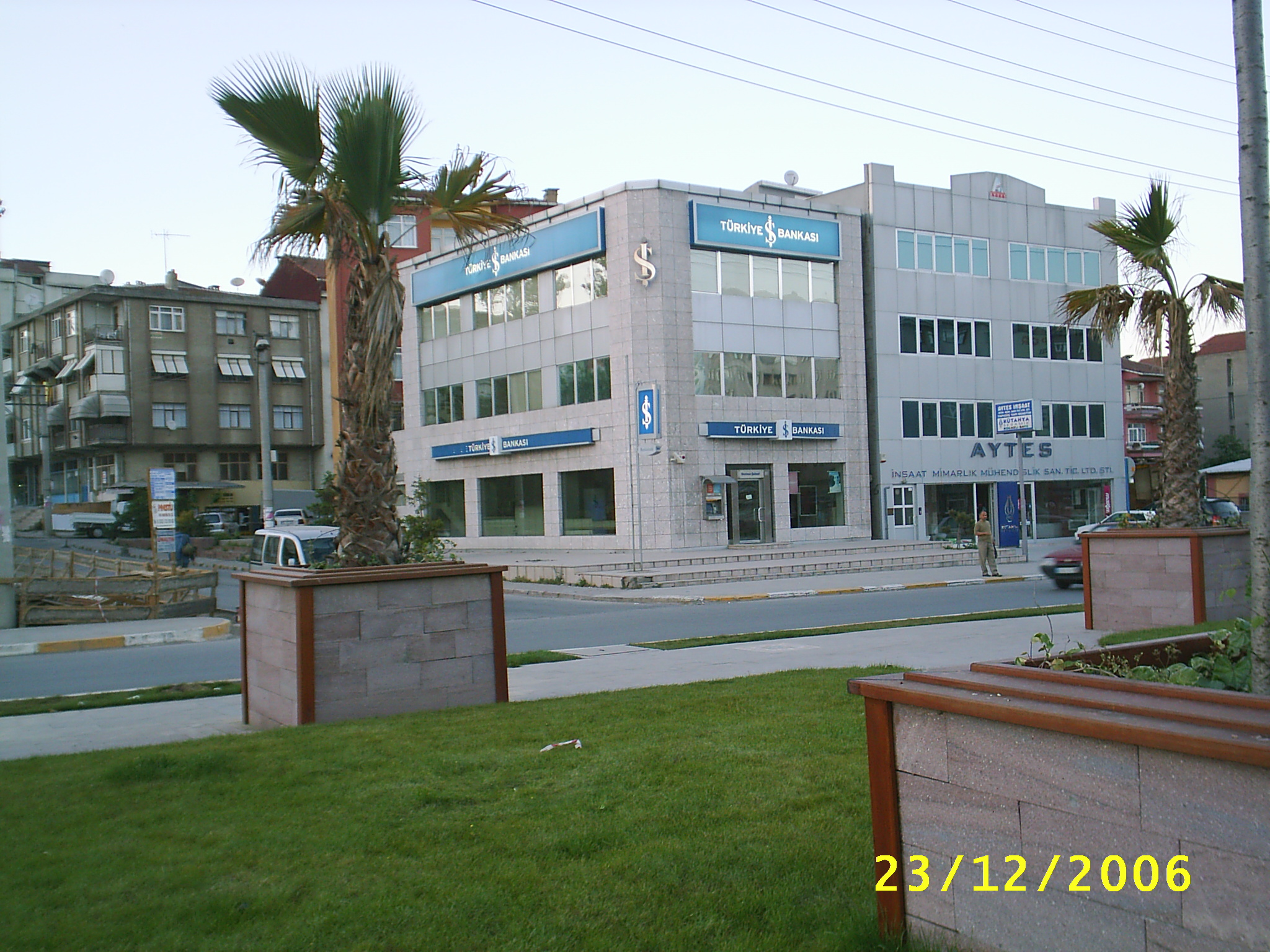 Derince İş Bankası